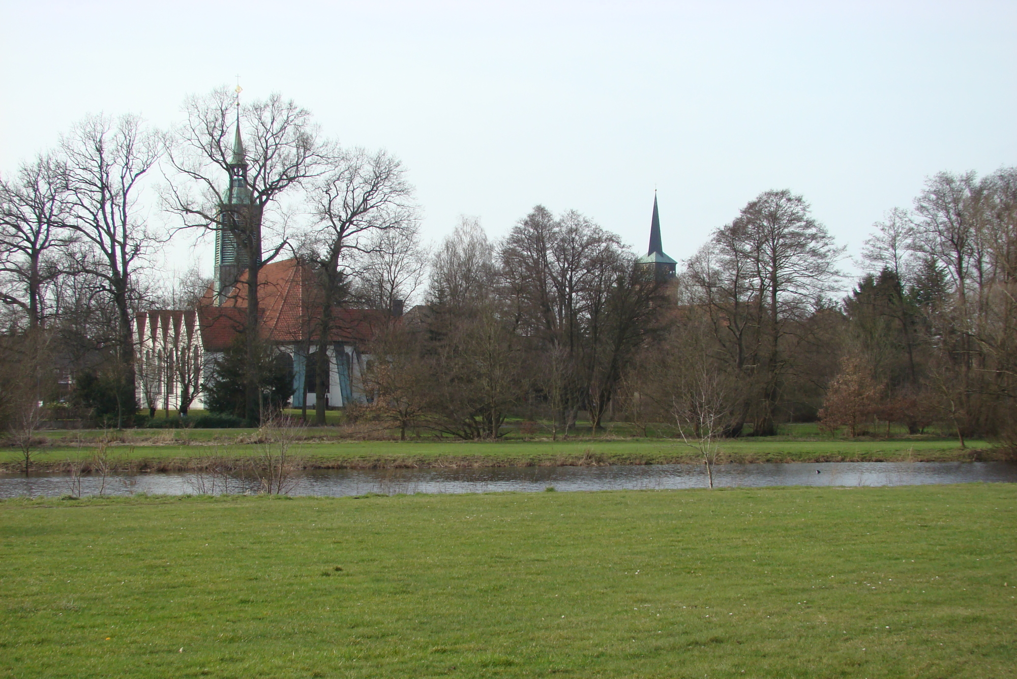 Hermannsburg Örtzepark mit Peter-Paul-Kirche (links) und Großer Kreuzkirche